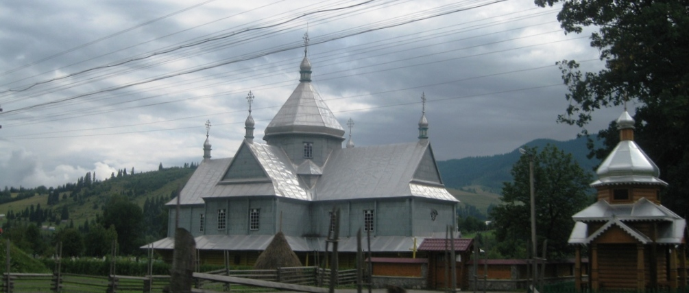 Церква Ільцях, Верховинський район